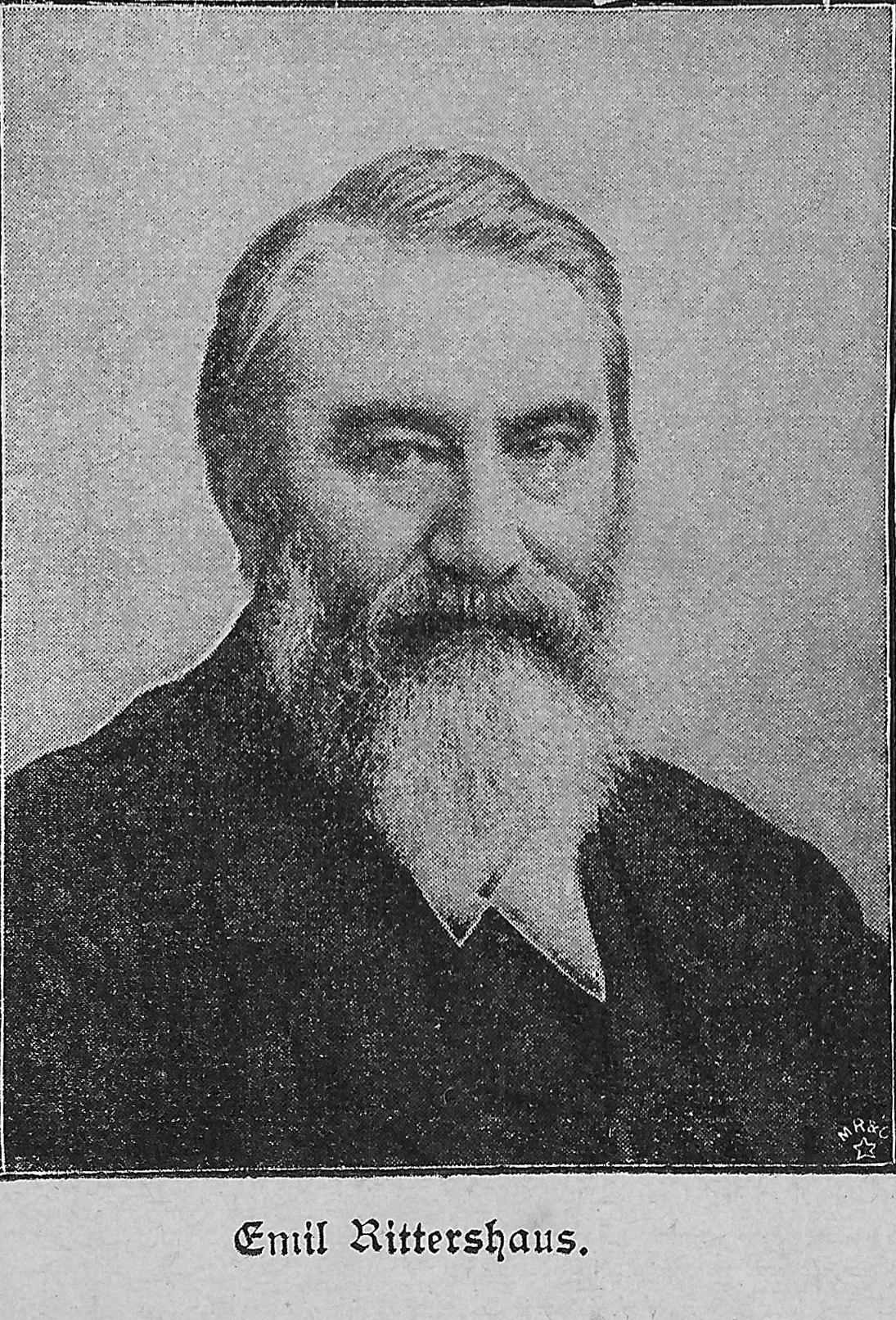 Aus Jaahrbuch der Berliner Morgenzeitung, Kalender 1898, Scan --Goerdten 23:23, 18. Jan. 2007 (CET)